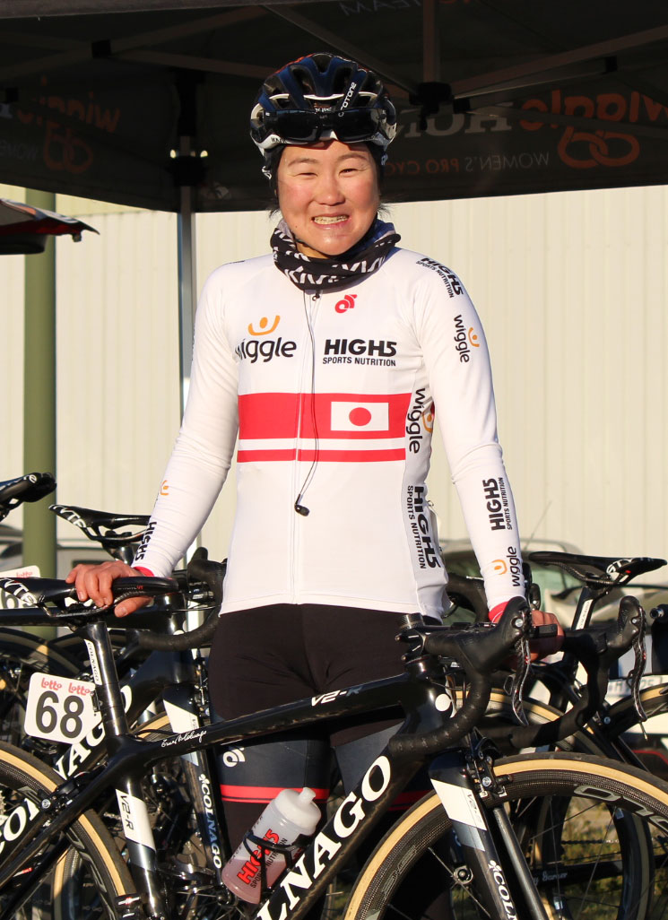 WiggleHigh5所属、與那嶺恵理選手